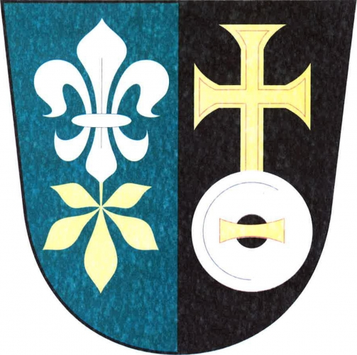 Znak, Černovice, okres Domažlice. "V zeleno-černě polceném štítě vpravo stříbrná lilie, z níž dolů vyrůstá svěšený zlatý list jírovce, vlevo zlatý tlapatý kříž vyrůstající ze stříbrného mlýnského kamene s položenou zlatou kypřicí."